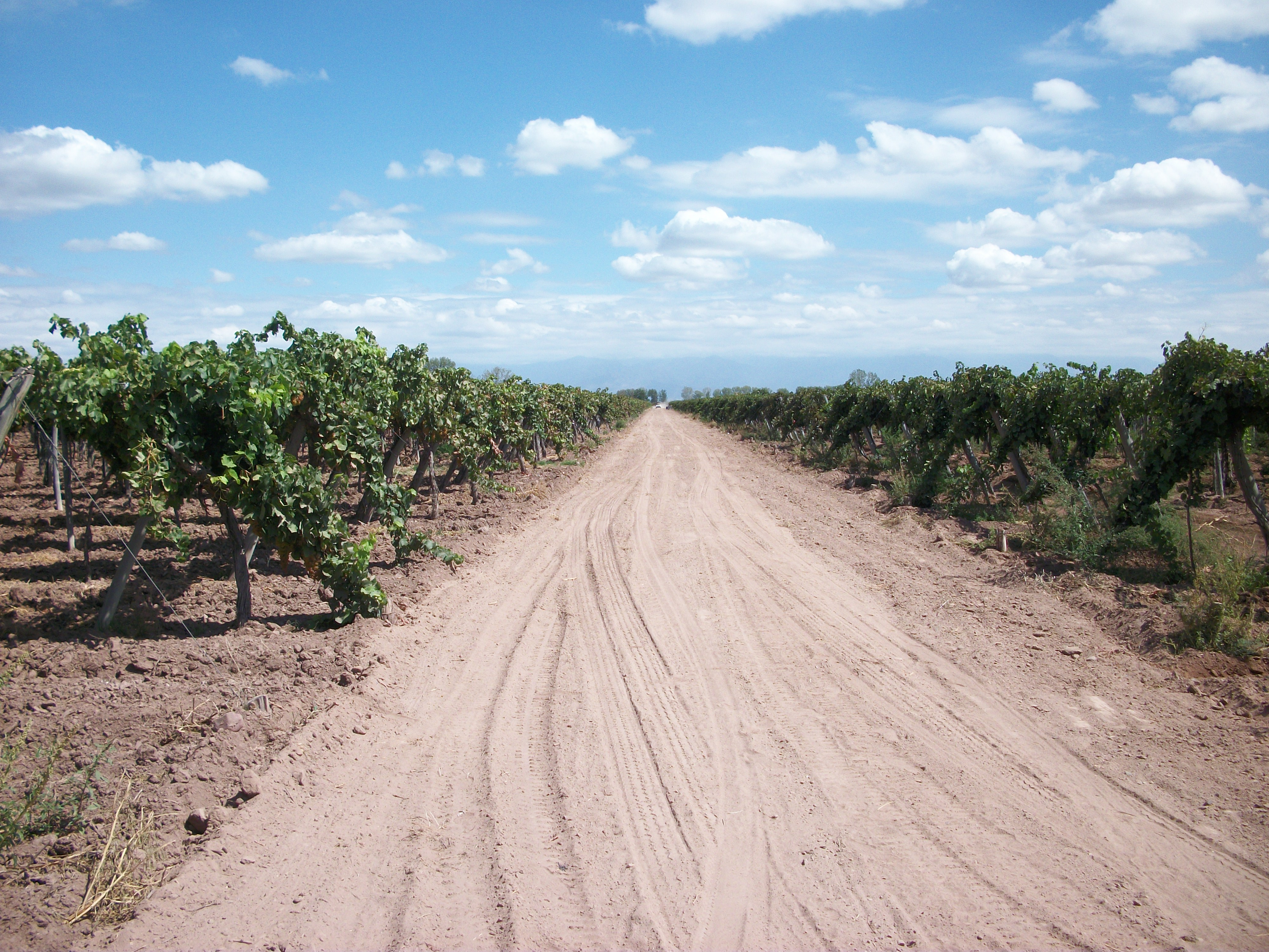 Viñedos de la variedad Torrontés Riojano, en el distrito de Fray Luis Beltrán, departamento de Maipú, provincia de Mendoza, República Argentina.